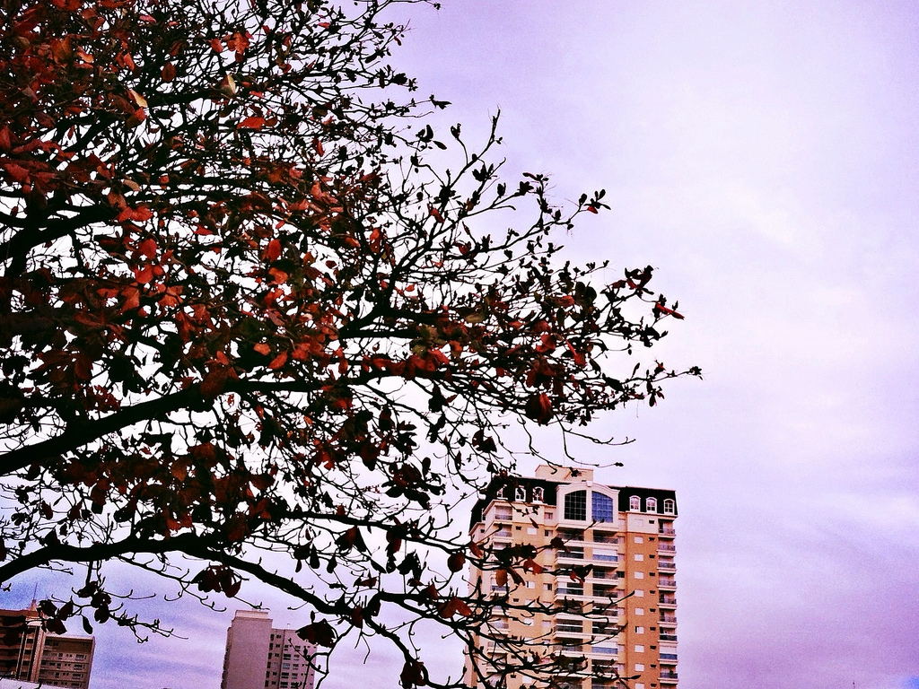 Prédios Araçatuba